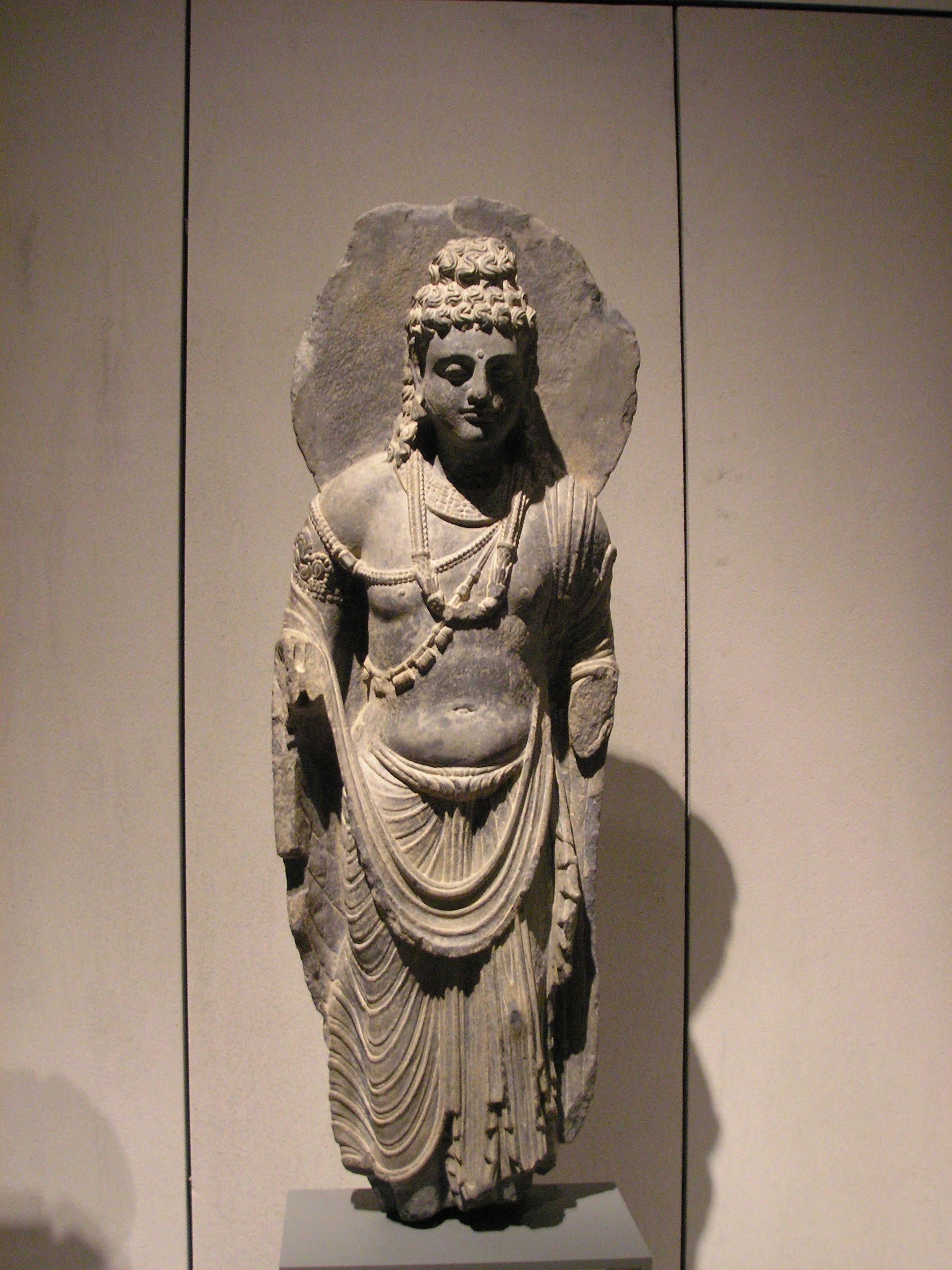 Standing Bodhisattva. Gandhara, 2nd - 3rd century CE. schist, height 102 cm. Located in the Museum für Indische Kunst, Berlin-Dahlem.